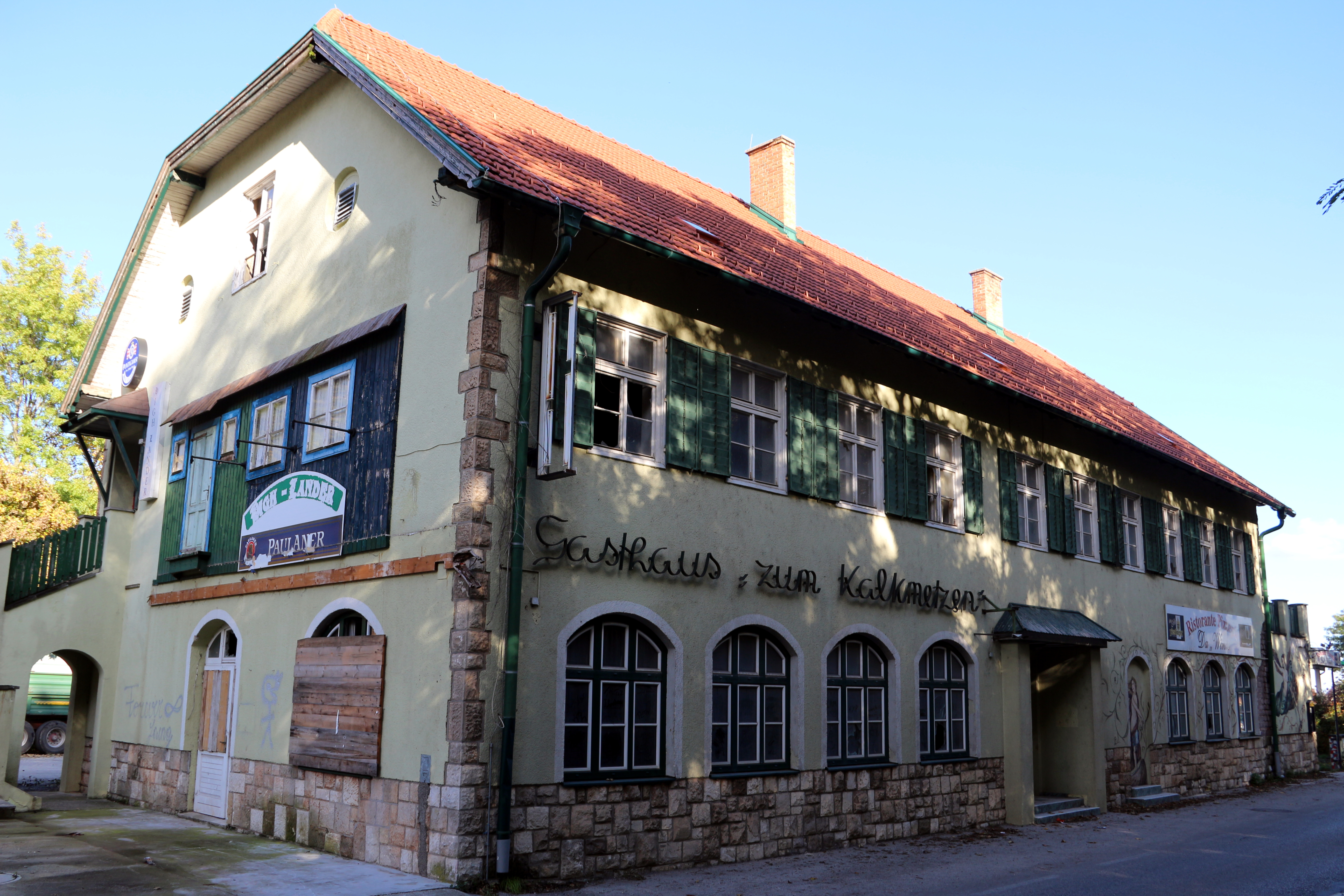 Ehemaliges Gasthaus "zum Kalkmetzen" in Winzendorf, Gemeinde Winzendorf-Muthmannsdorf, Niederösterreich. Seit ca. 2010 dem Verfall preisgegeben.